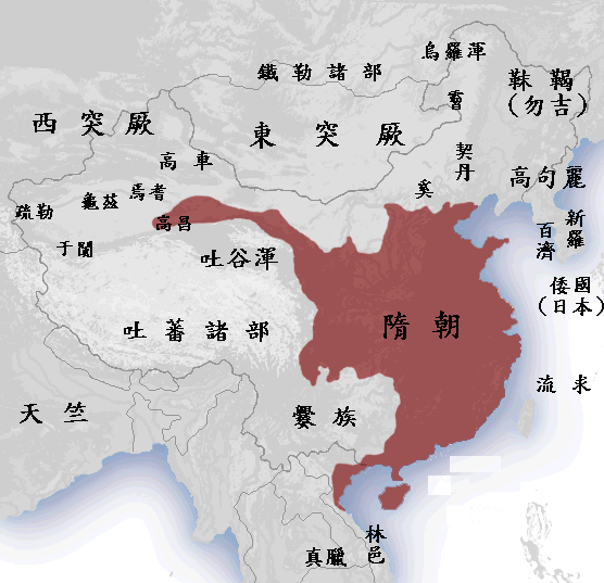 隋朝與周邊國家關係圖。